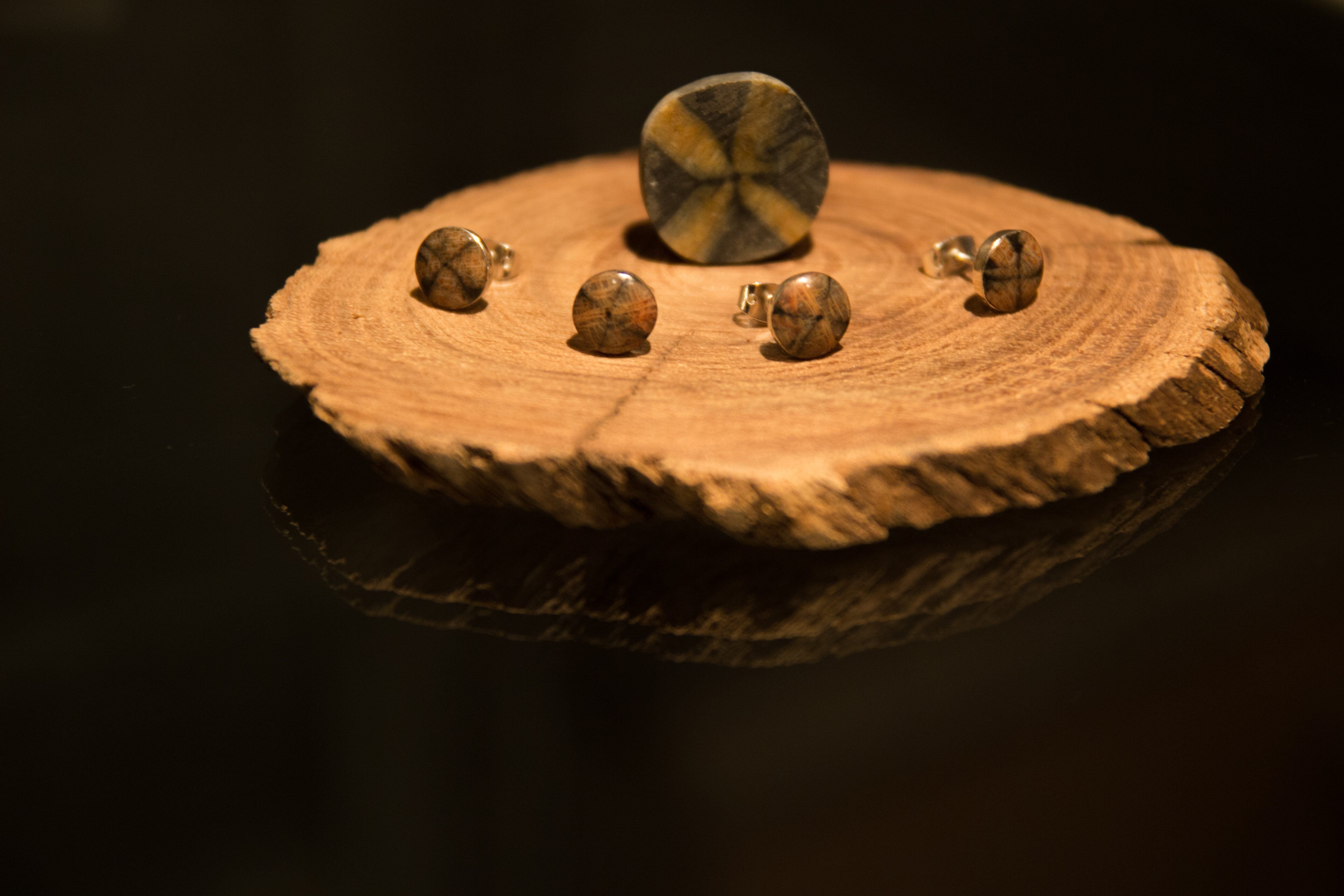 Artesanía en Piedra Cruz, Laraquere